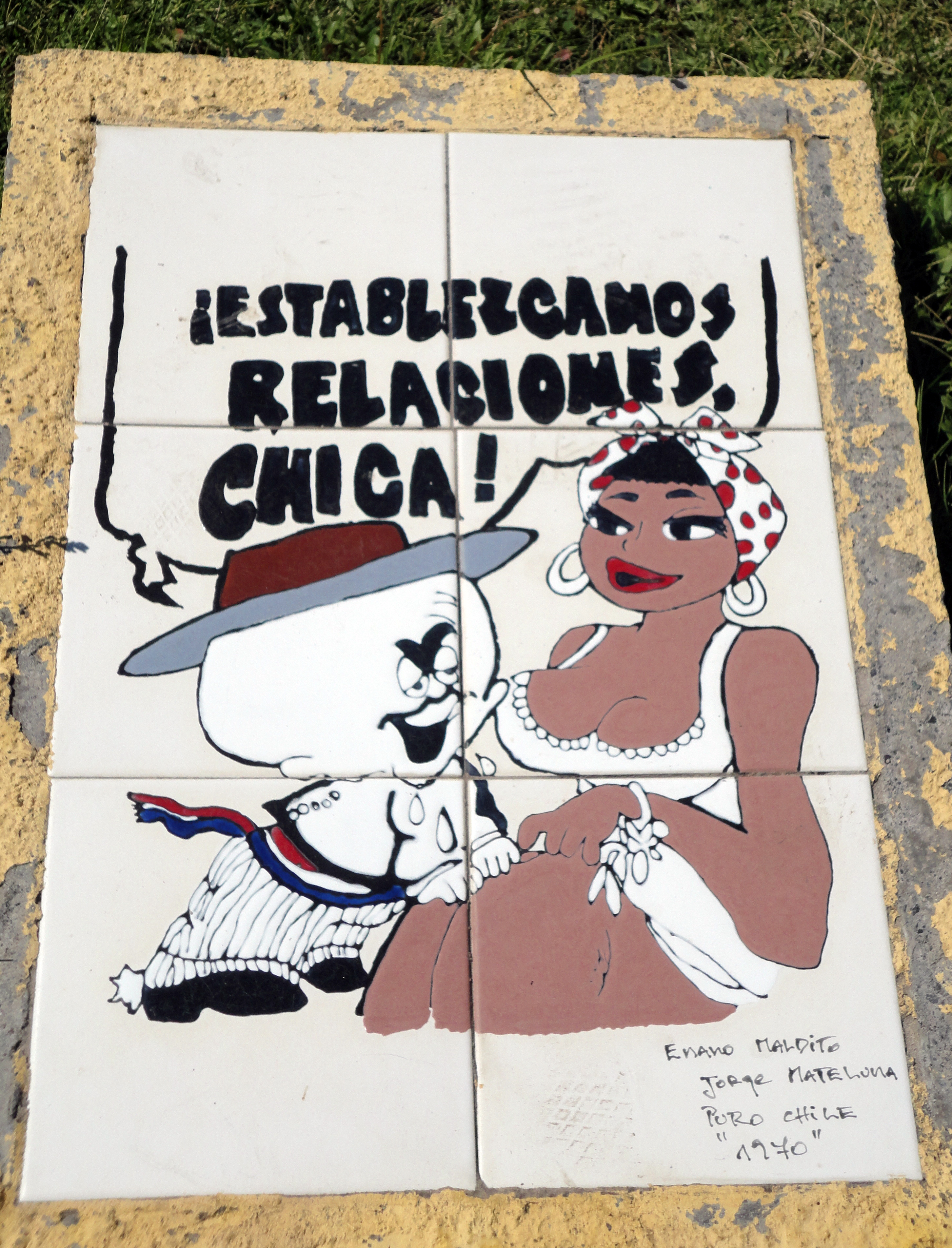 Imagen en cerámica de una caricatura del Enano Maldito, personaje de Jorge Mateluma (Orsus) para el diario Puro Chile en 1970. Parque del Cómic de San Miguel, Santiago.